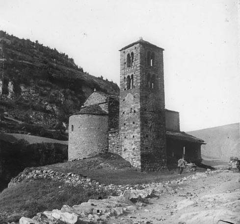 Posterior de l'església de Sant Joan de Caselles , a Canillo. Frederic Bordas i Altarriba (1882)